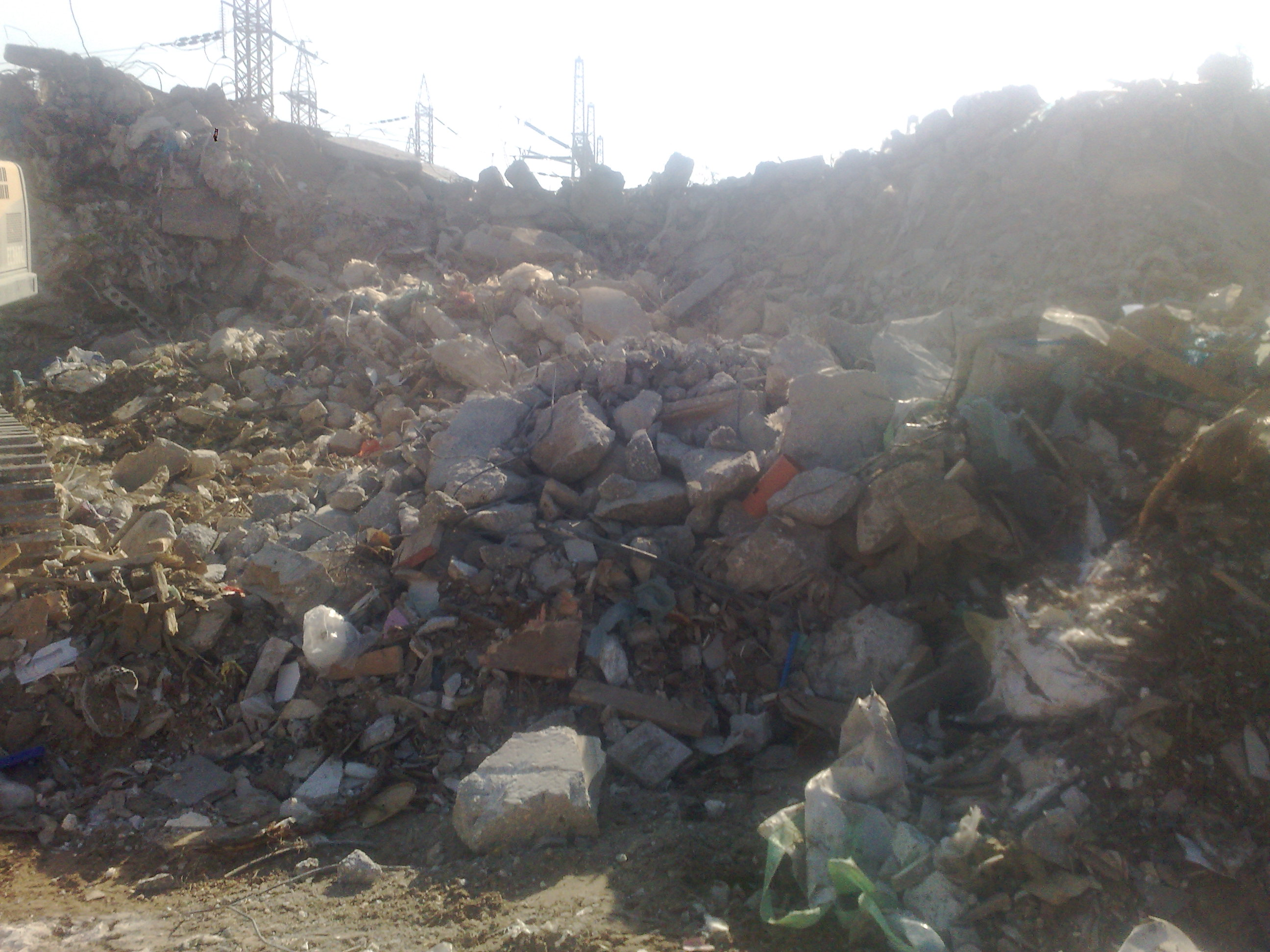 ערימת פסולת בניין באתר הרצליה צולם באדיבות חברת "בני וצביקה בע"מ"